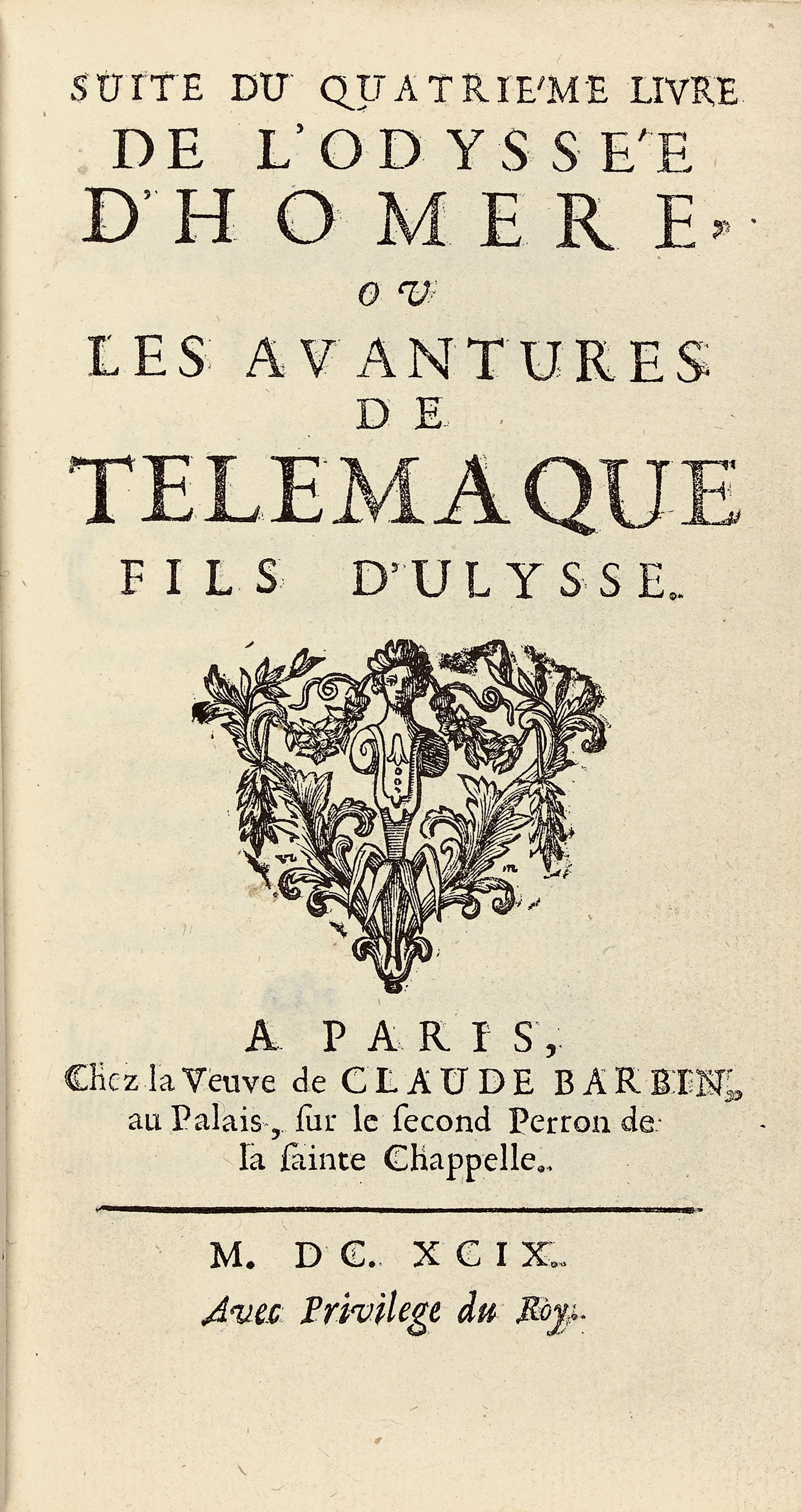 François Fénelon: Suite du quatrième livre de l'Odyssée d'Homère, ou les Avantures de Télémaque, fils d'Ulysse. Veuve de Claude Barbin, Paris 1699, Titelseite.